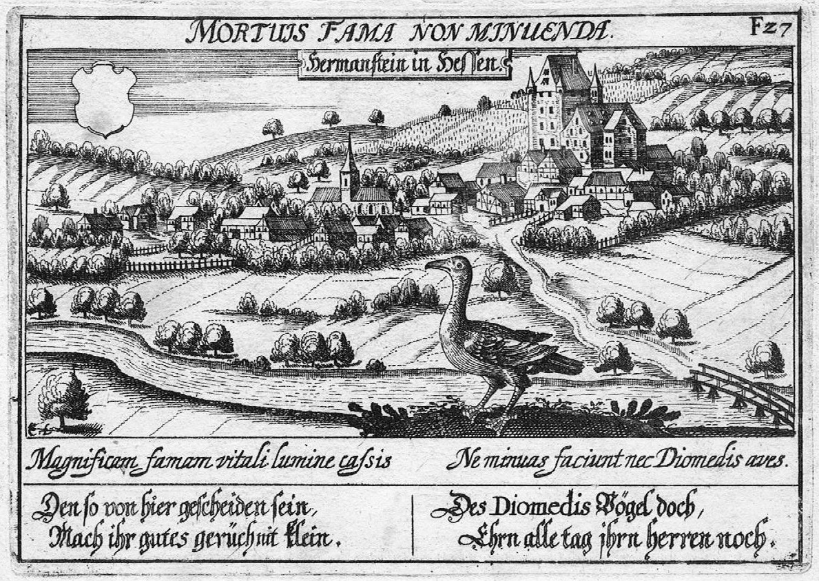 “Hermanstein in Hessen”. Kupferstich aus Daniel Meisner’s Schatzkästlein.